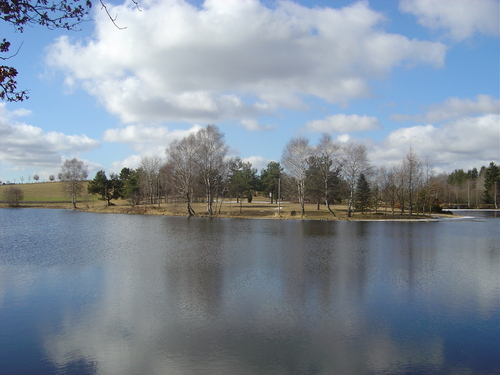 etang de farges